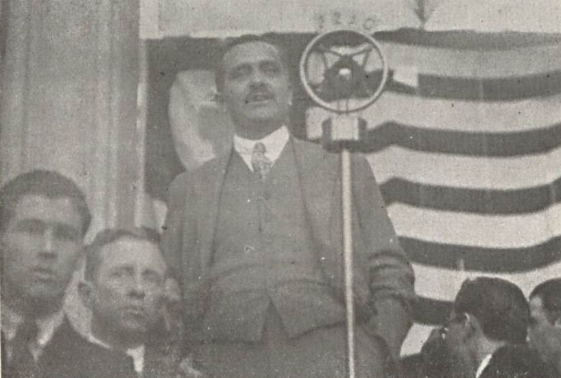 Manifestação Paulista de maio de 1932 na Praça da Sé. Waldemar Ferreira discursa ao povo e pelo Microfone da Rádio PRAO (Rádio Cruzeiro do Sul) em defesa da Constitucionalização do país.